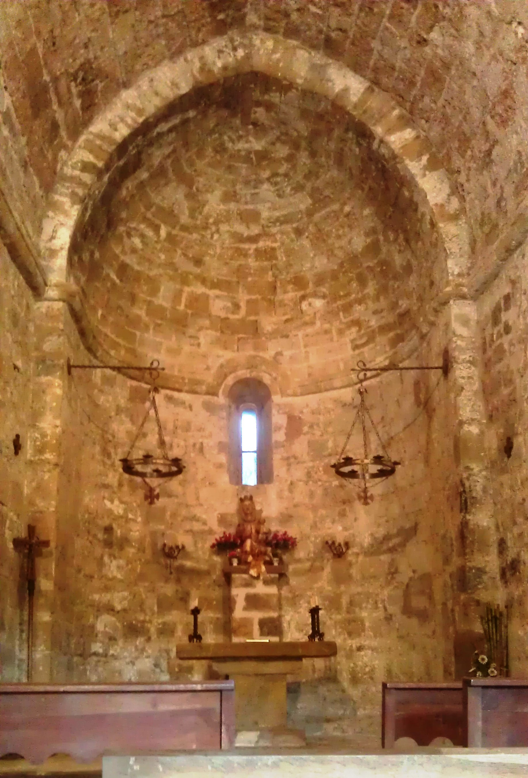 Romanische Kapelle Santa Maria de Palera (Altar, Innen)